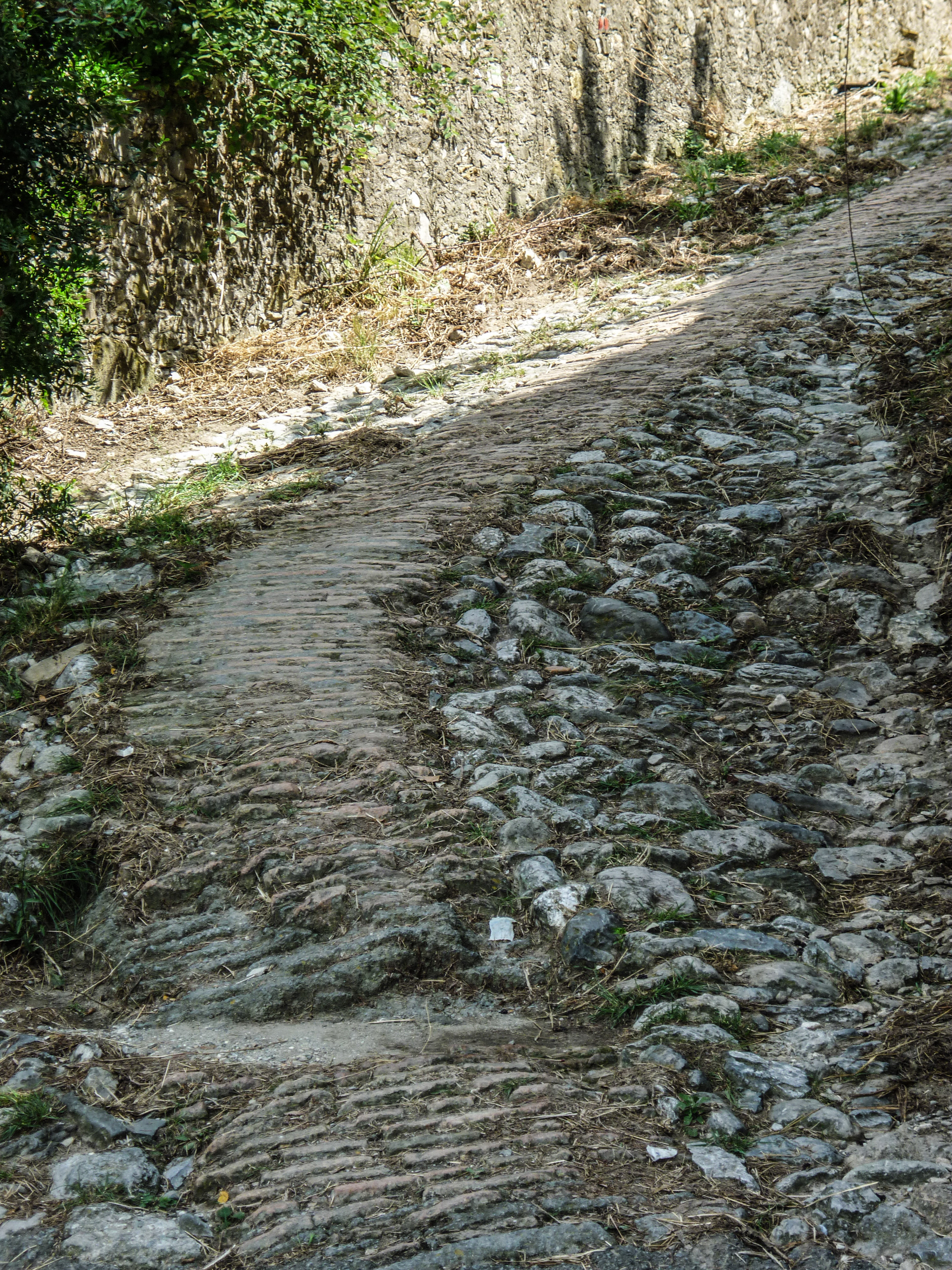 Tronçon, à la sortie de « Albingaunum », cité romaine d Albenga (Ligurie, Italie), de la voie romaine « Via Julia Augusta ».